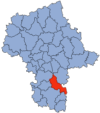 Powiat kozieniecki